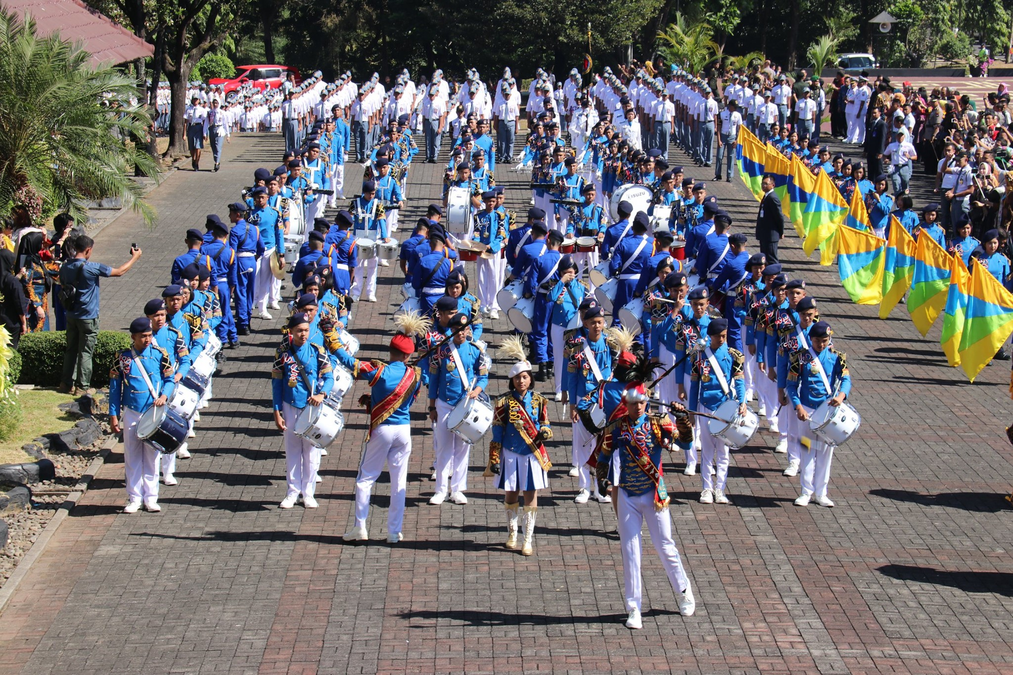 Penampilan Marching Band SMA TN